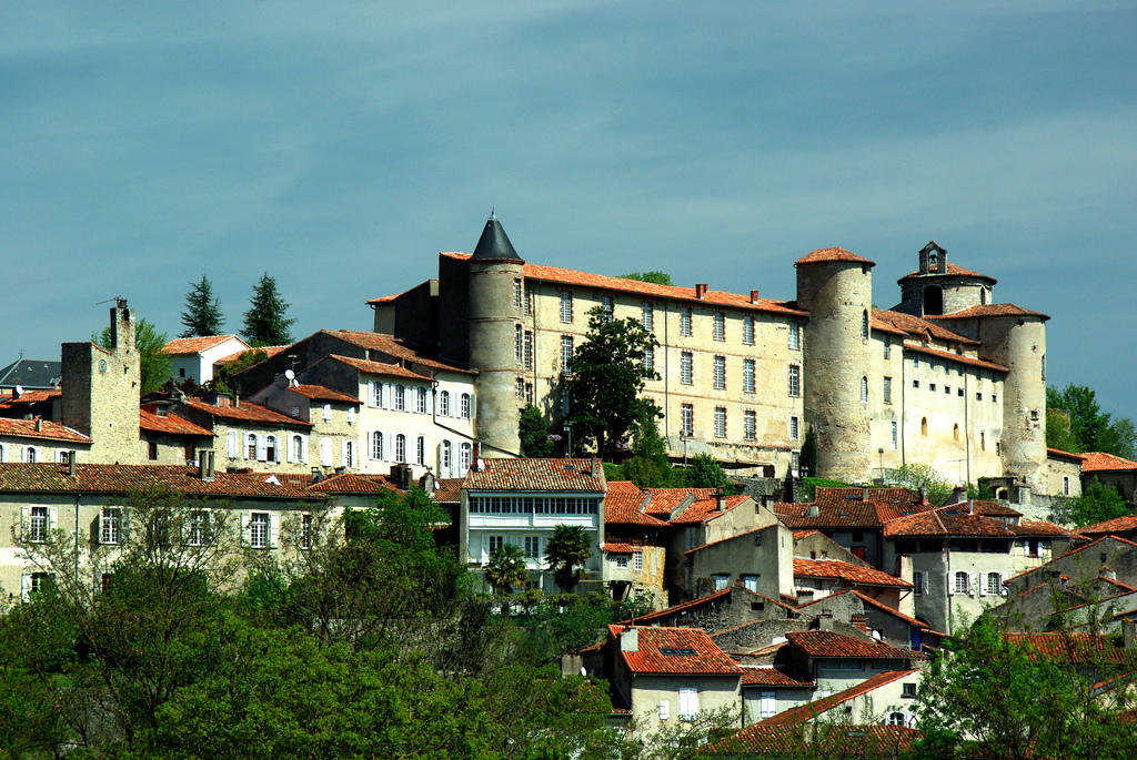 Saint-Lizier (Ariège, France) - Le Palais épiscopal dominant le village. .